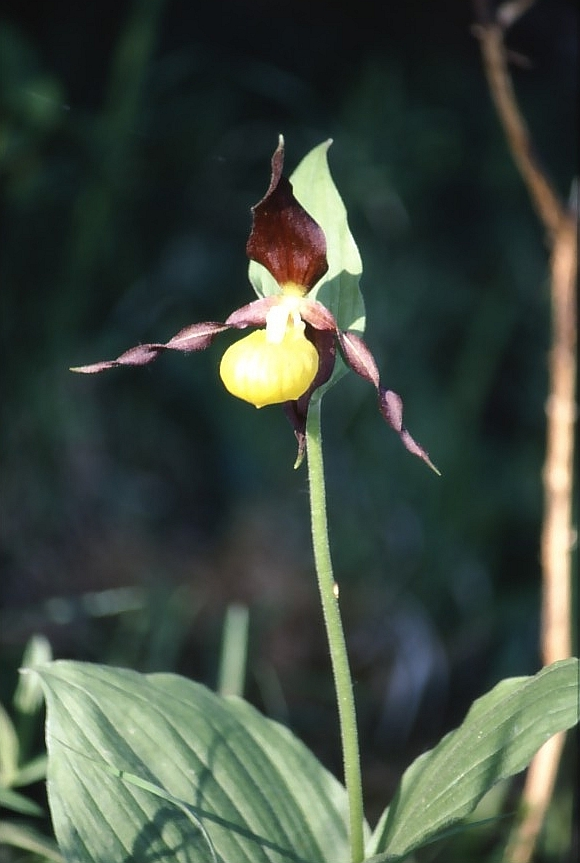 Rotbrauner Frauenschuh (Cypripedium calceolus) im Biotop Pranhartsberg, Gemeinde Sitzendorf an der Schmida